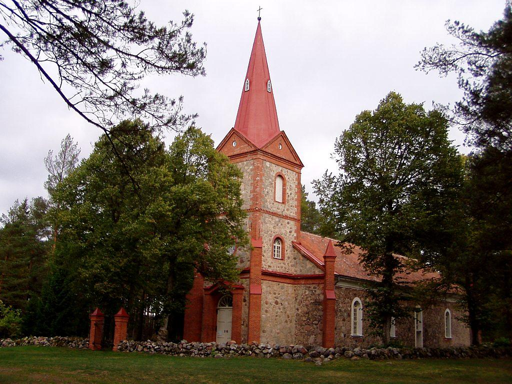 Rindas evaņģēliski luteriskā baznīca. 2006-10-14